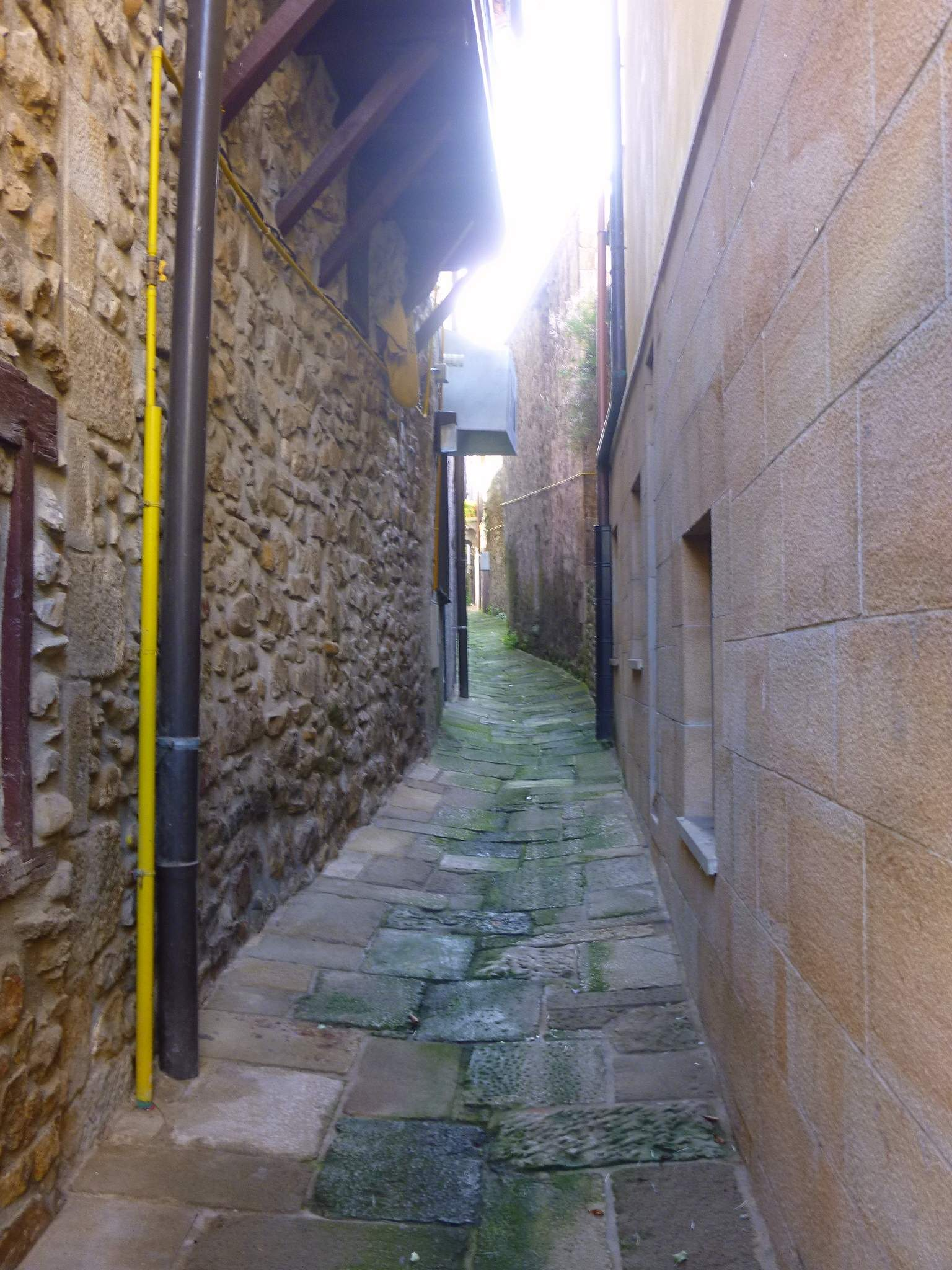 Segura (Gipuzkoa) - La Cárcava